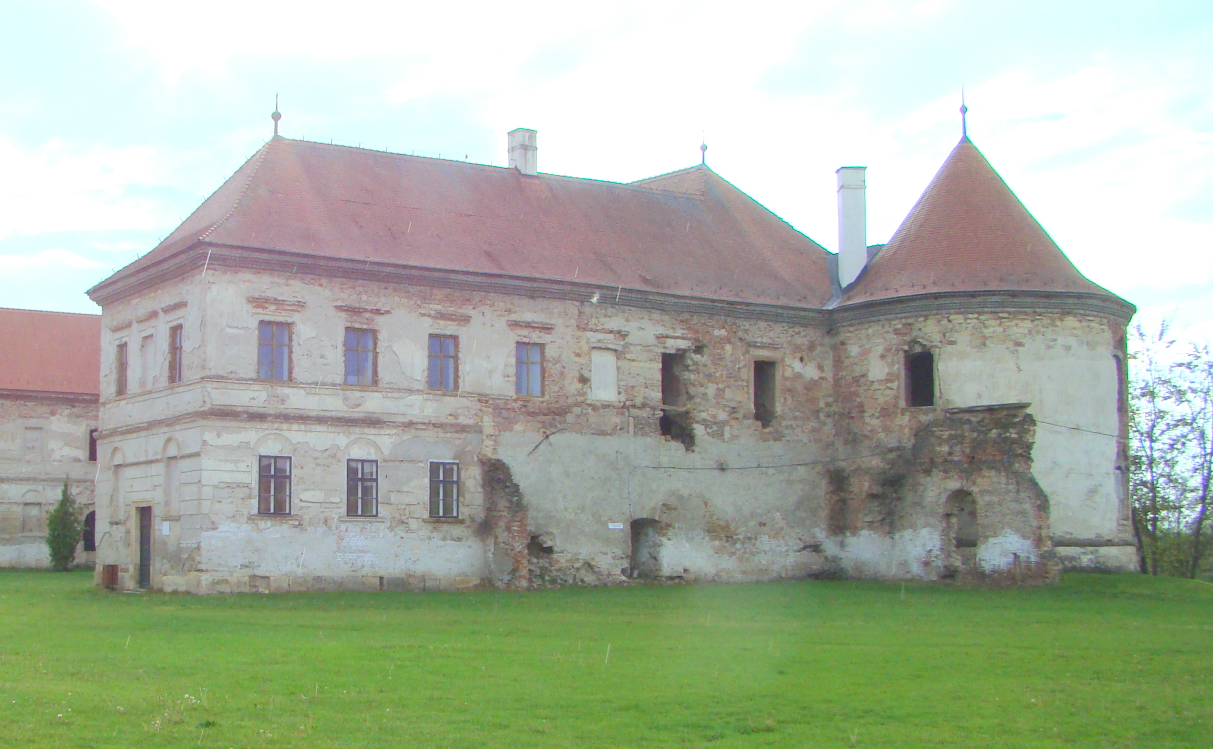 Corpul 2 al castelului, sat Bonțida; comuna Bonțida 02